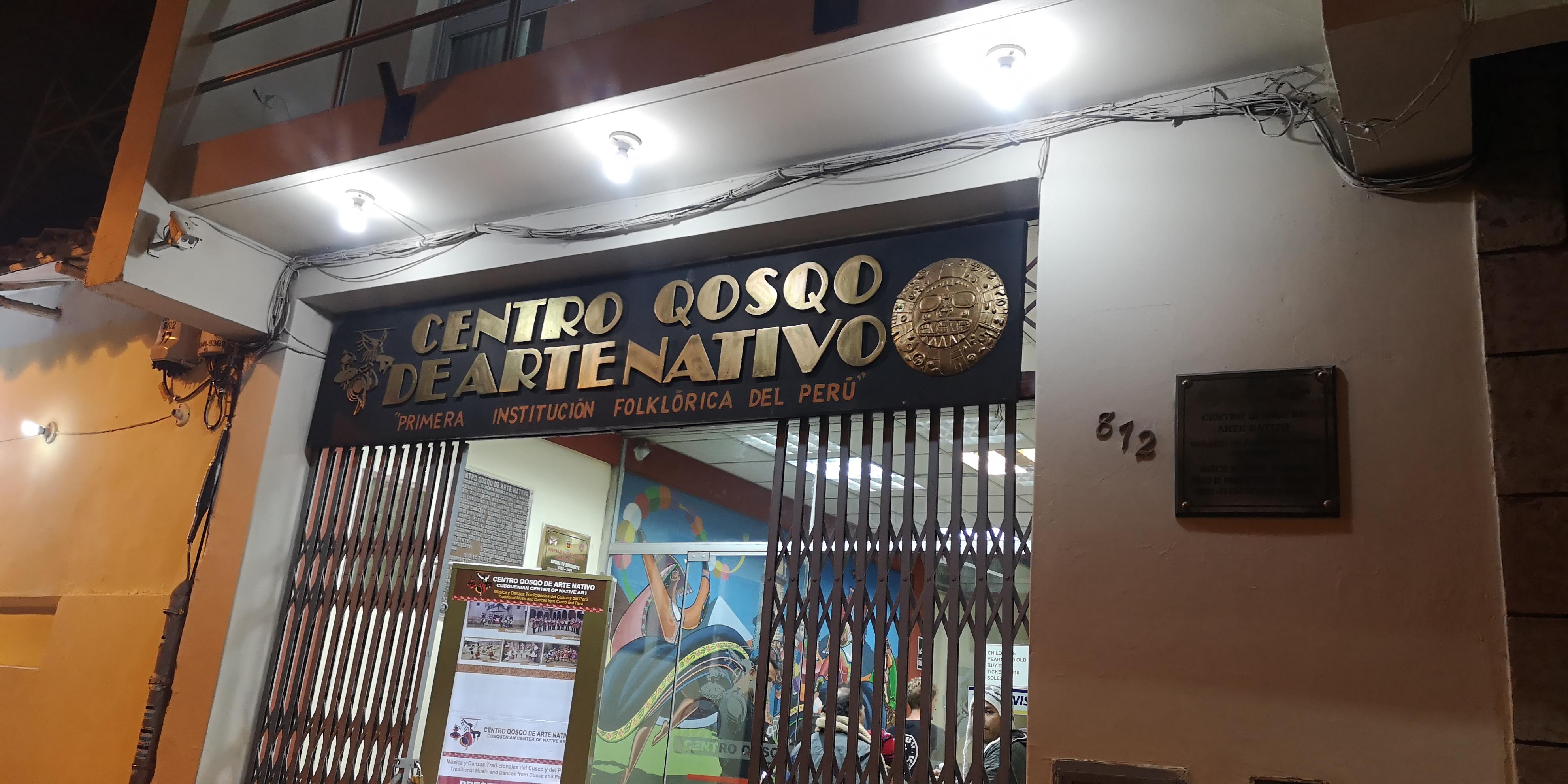 Detalle de la puerta de ingreso del edificio del Centro Qosto de Arte Nativo en Cusco, Perú